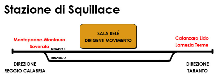 Piano Binari Stazione di Squillace